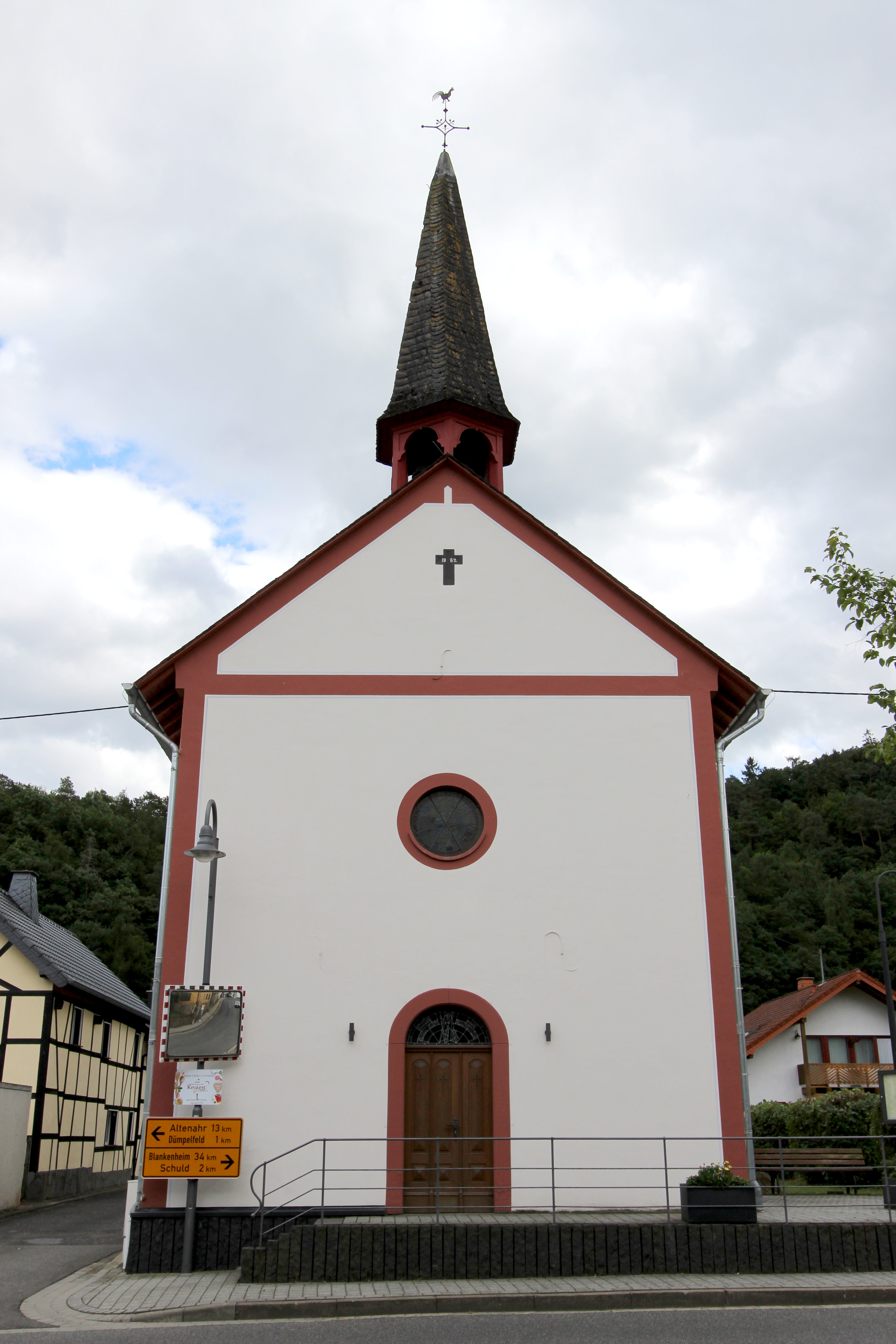 53520 Insul, Hauptstraße 22. Saalbau, bezeichnet 1882. Aufnahme von 2017.